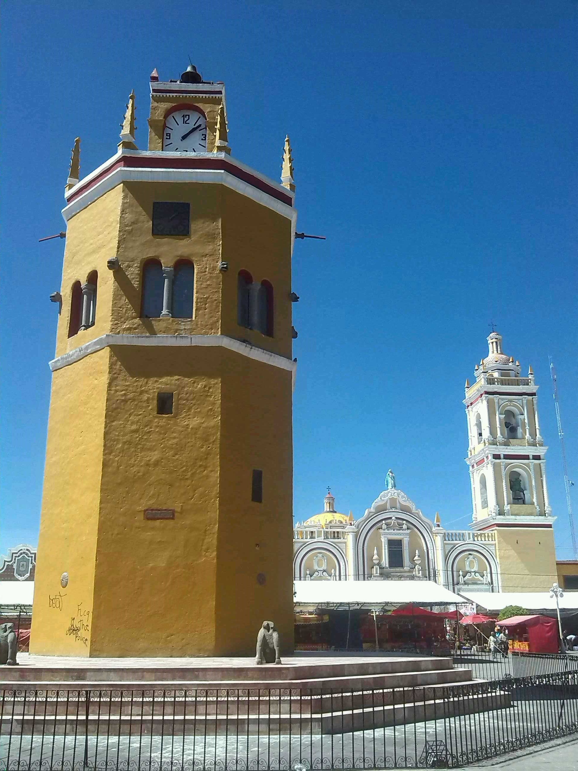 Reloj e Iglesia de San Francisco en Tepeaca